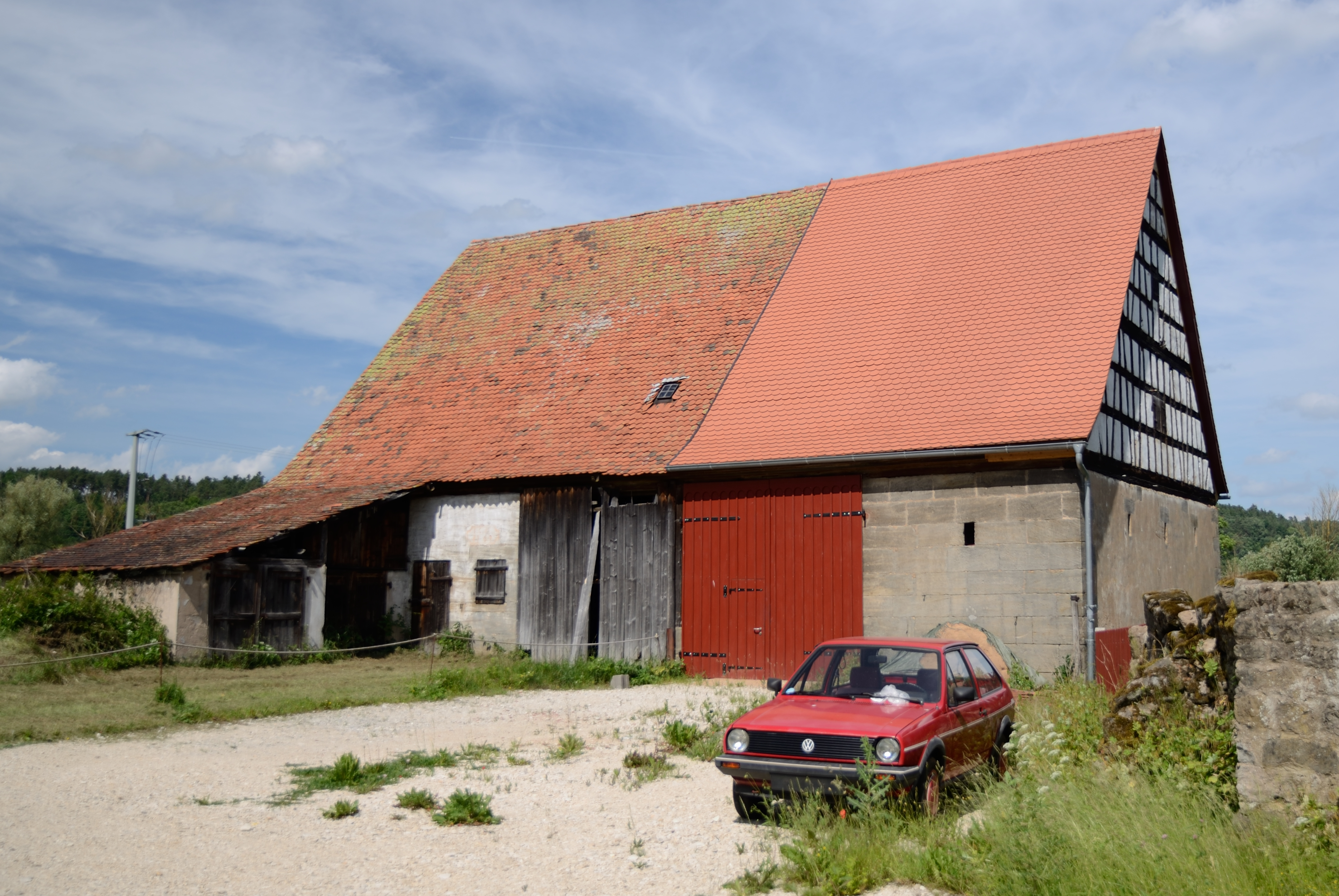 Steinbach, Silberbachstraße 11: Scheune, zu einem ehemaligen Gutshof gehörig. Eingeschossiger Natursteinquaderbau mit Satteldach und Fachwerkgiebel, 1797.